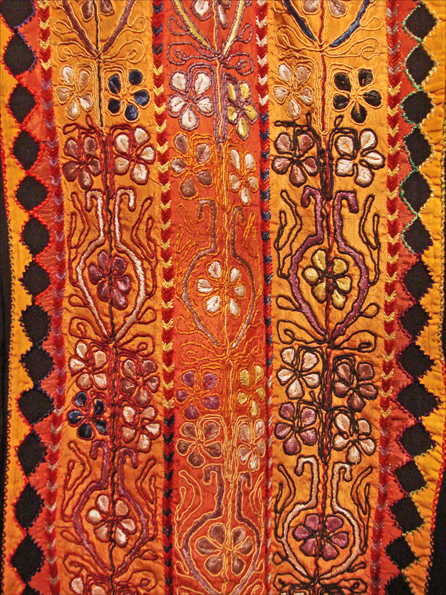 Robe de fête, jellayé (détail de la broderie centrale) Al-Mesmiya (Région de Gaza) vers 1920 Tissu de coton, applications de soie, broderies de soie et coton Collection Widad Kamel Kawar Photo Annie Dalbéra Exposition L'Orient des Femmes vu par Christian Lacroix Musée du Quai Branly